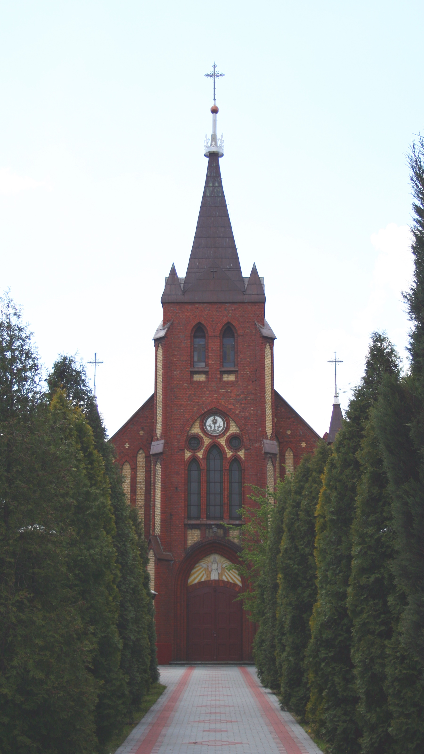 kościół mariawitów w Gniazdowie, Polska, województwo śląskie, powiat myszkowski